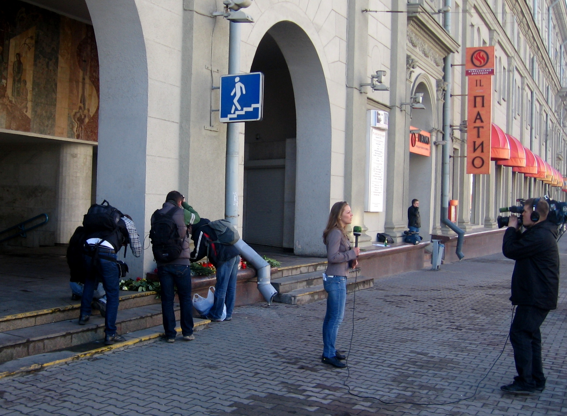 Первое утро после трагедии. Выход из метро "Октябрьская". Работа журналистов (телеканал RT (Russia Today)).